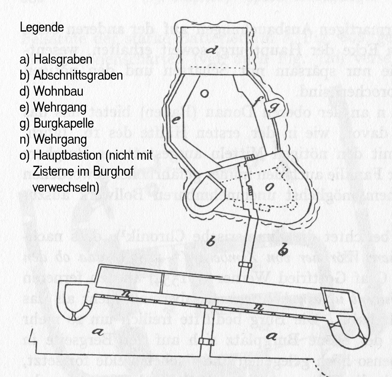 Burg Wildenstein Grundriss der Burg Legende hinzugefügt